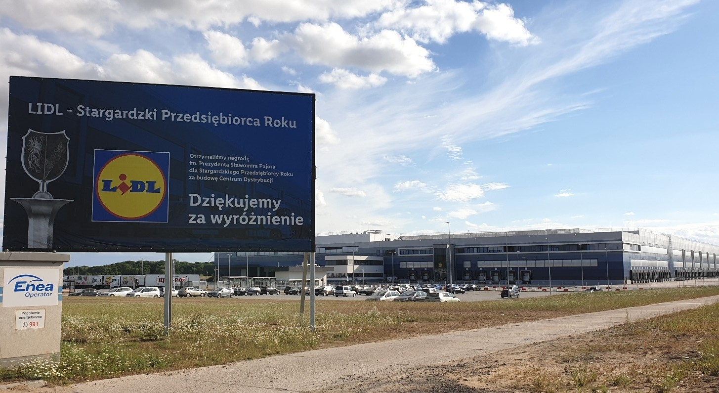 Koncern Lidl